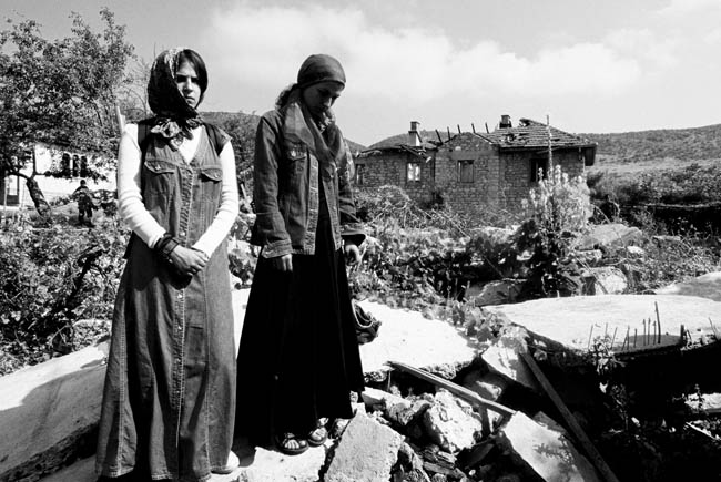 Косово и Метохија: Две хришћанке се моле на рушевинама манастира светог козме и дамјана у селу Зочишту. Манастир су динамитом срушили албански терористи. Фотографија из пројекта "Корени душе". Фото:Дарко Дозет